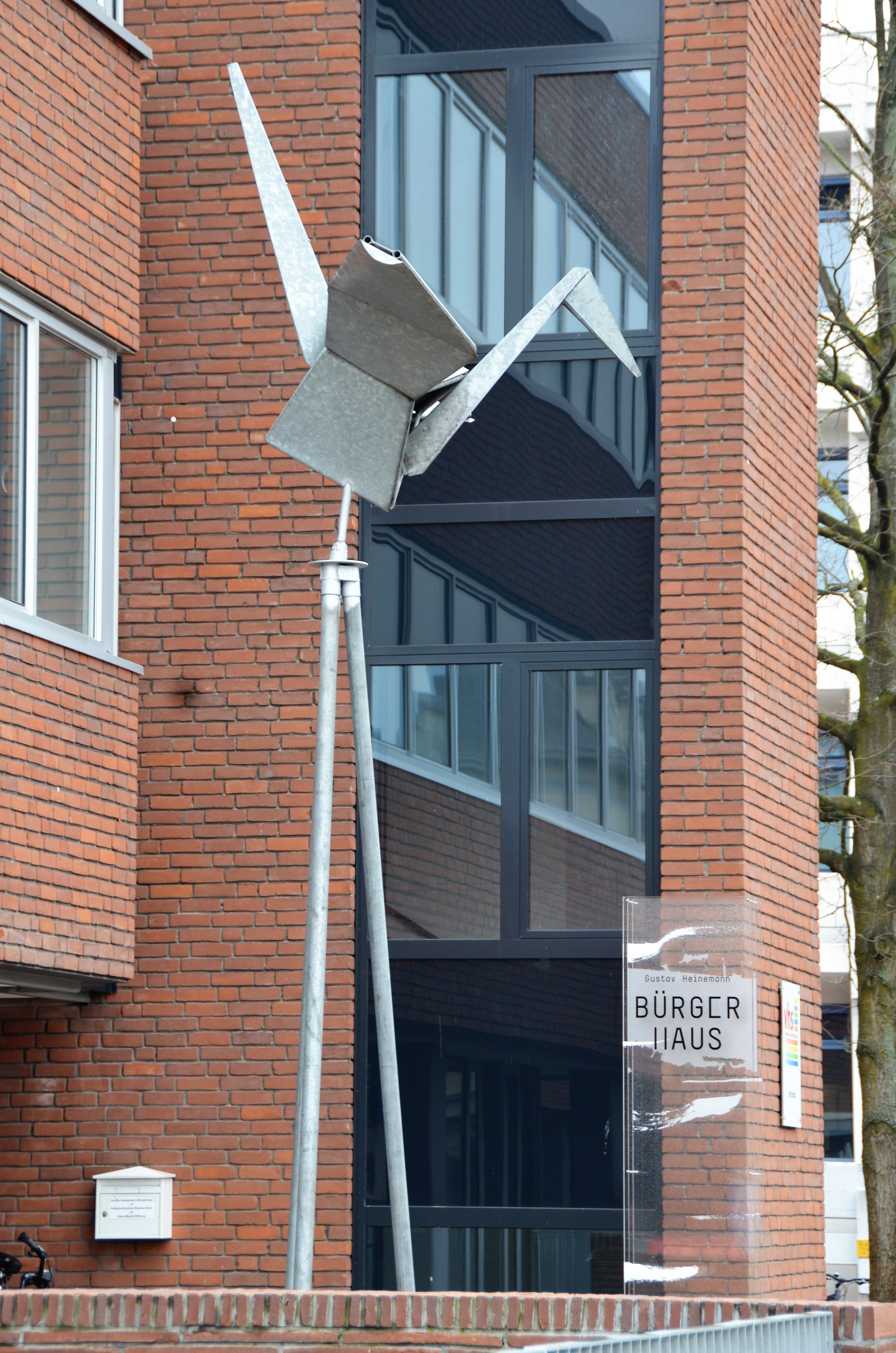 Kranich-Skulptur als Friedenssymbol vor dem Eingang zum Gustav-Heinemann-Bürgerhaus an der Straße Kirchheide in Bremen-Vegesack